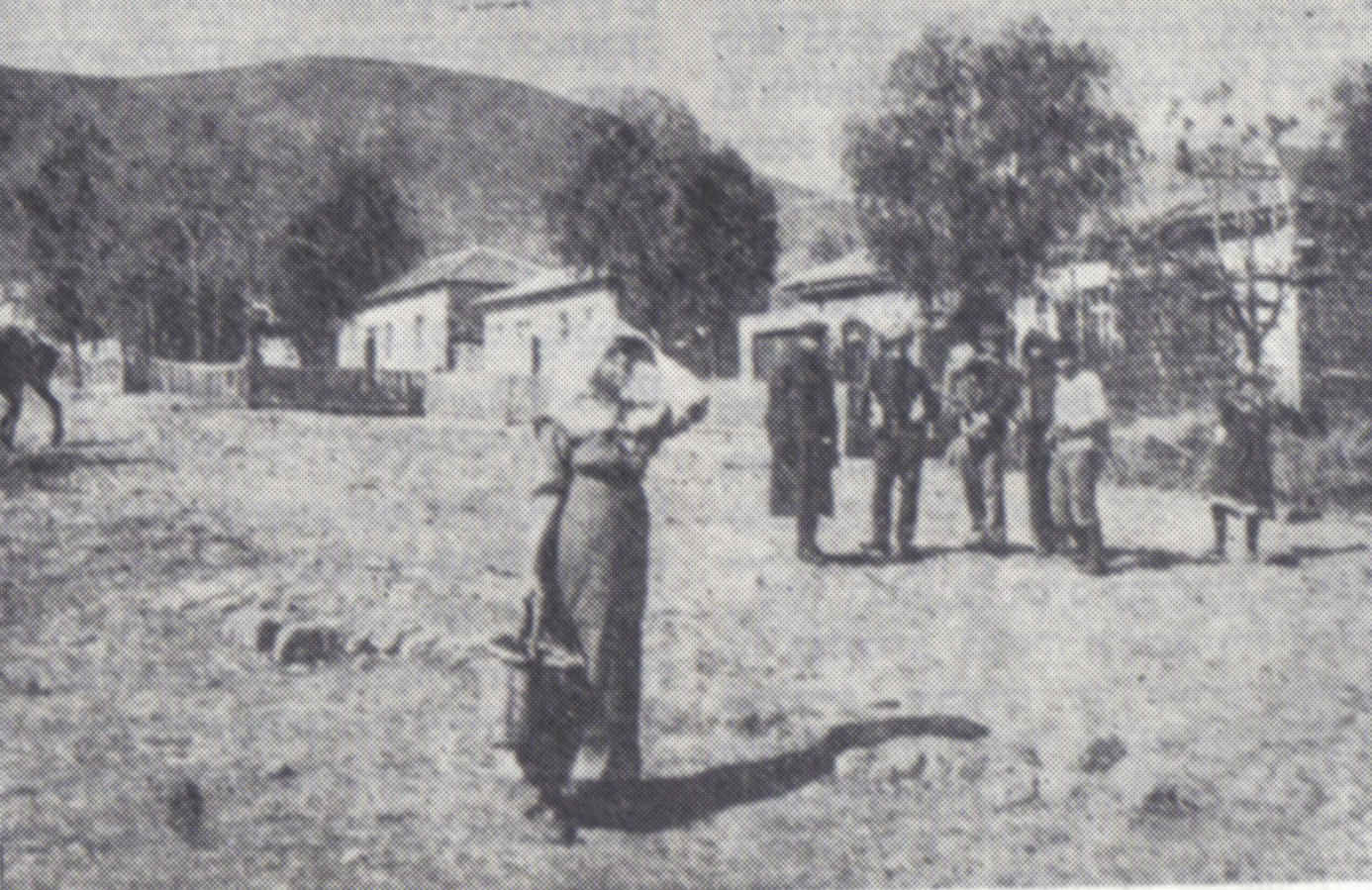 המושבה יבנאל כפי שצולמה ב-1910